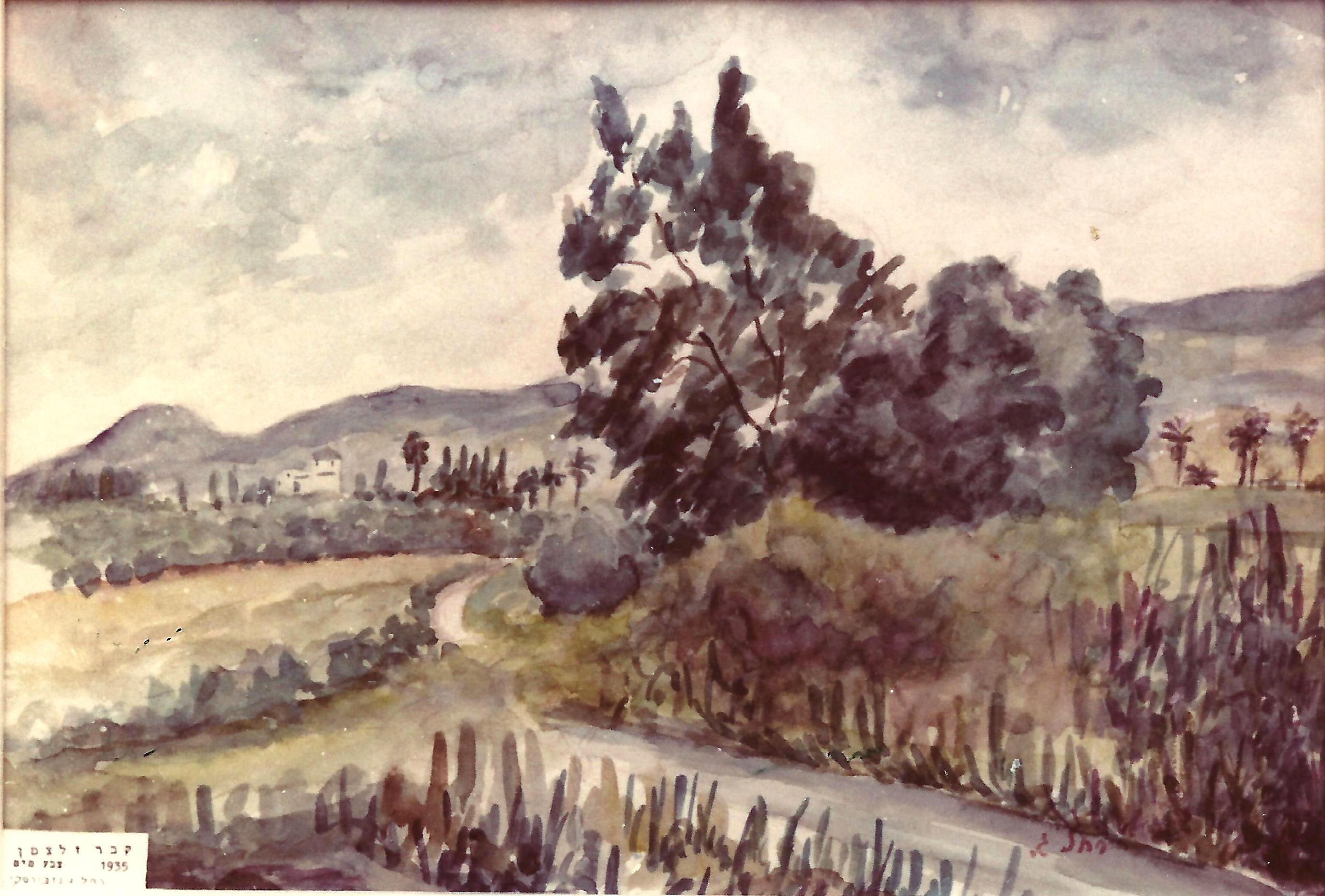 ציור של אזור קבר יוסף זלצמן הנמצא ליד עץ הקזוארינה, השדרה המובילה לקבר כפי שצויר על ידי רחל גינזבורסקי ציירת חברת קבוצת כנרת בשנת 1935 ברקע אפשר לראות את מבני ביתניה תחתית